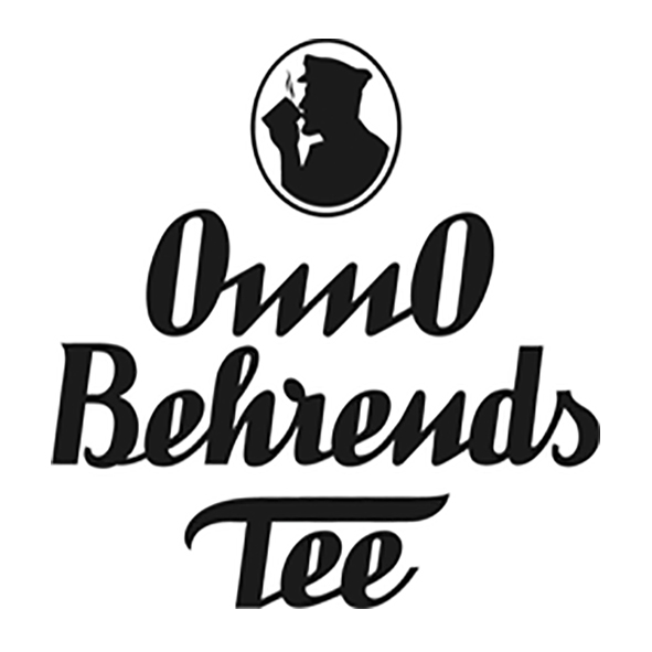 OnnO Behrends Logo Stand September 2019